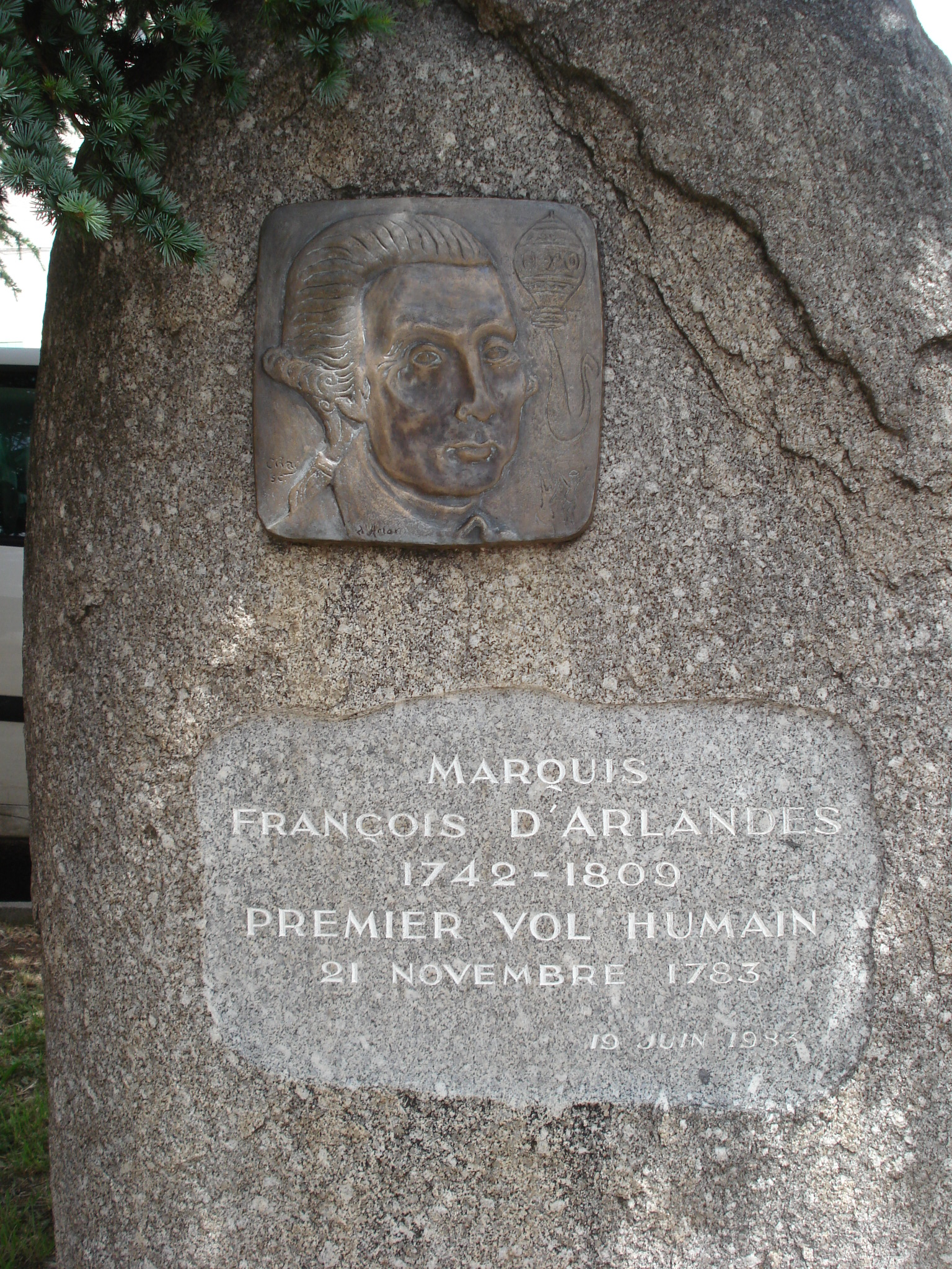 plaque commémorative du premier vol humain de François d'Arlandes